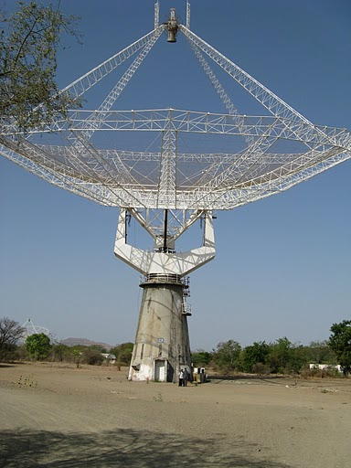 ജയിന്റ്റ്‌ മീറ്റർ വേവ് റേഡിയോ ടെലിസ്കോപ്പ്